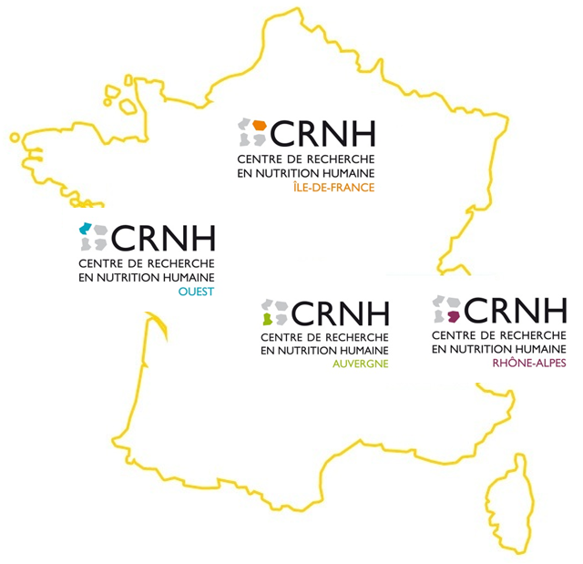 Carte de France des CRNHs